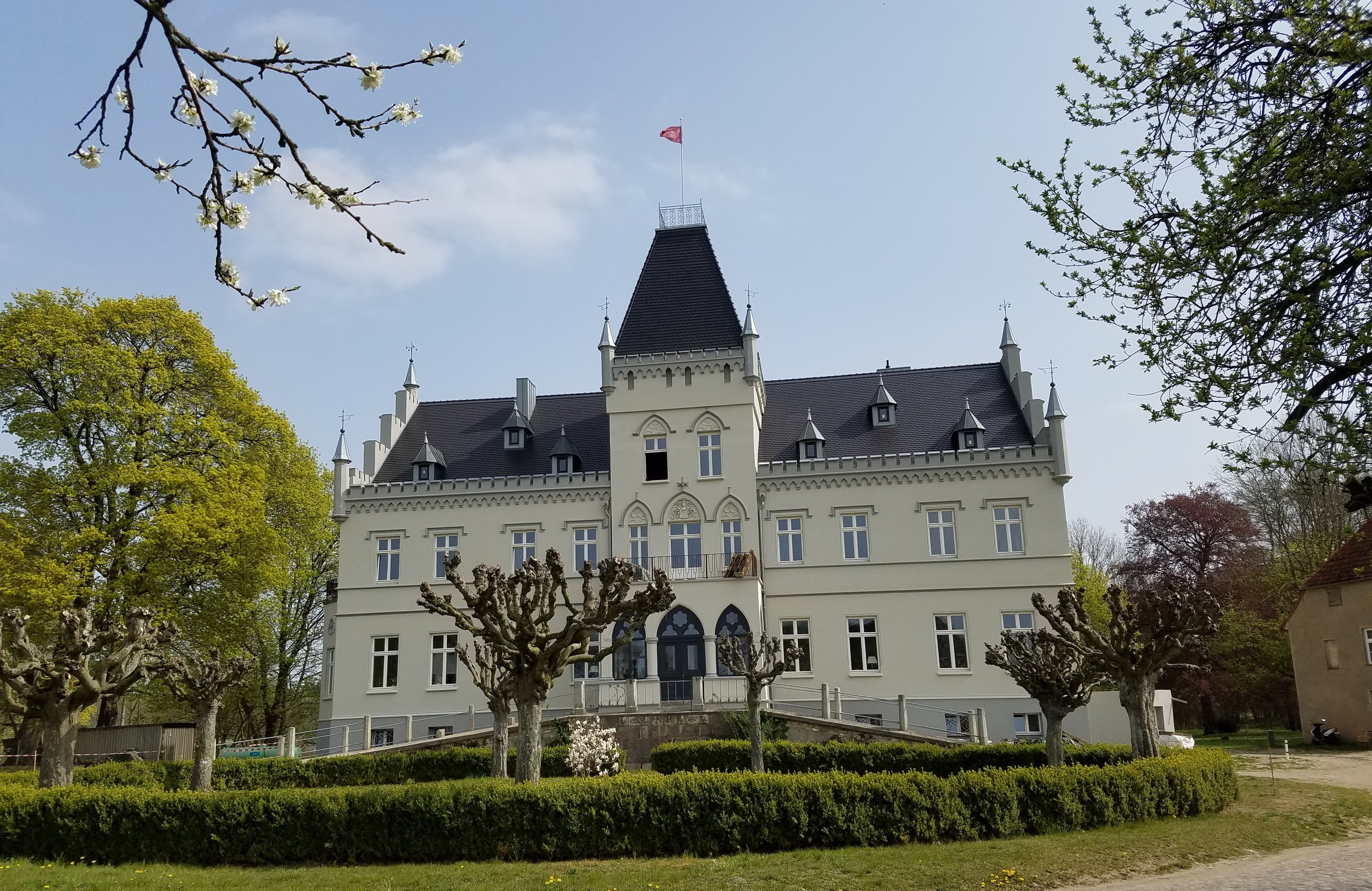 Herrenhaus Schloss Wrangelsburg, Landkreis Vorpommern-Greifswald (Deutschland)